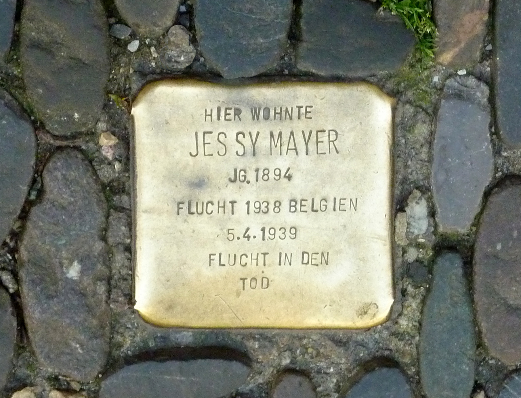 Stolperstein für Jessy Mayer vor dem Haus Salzstraße 24, Freiburg